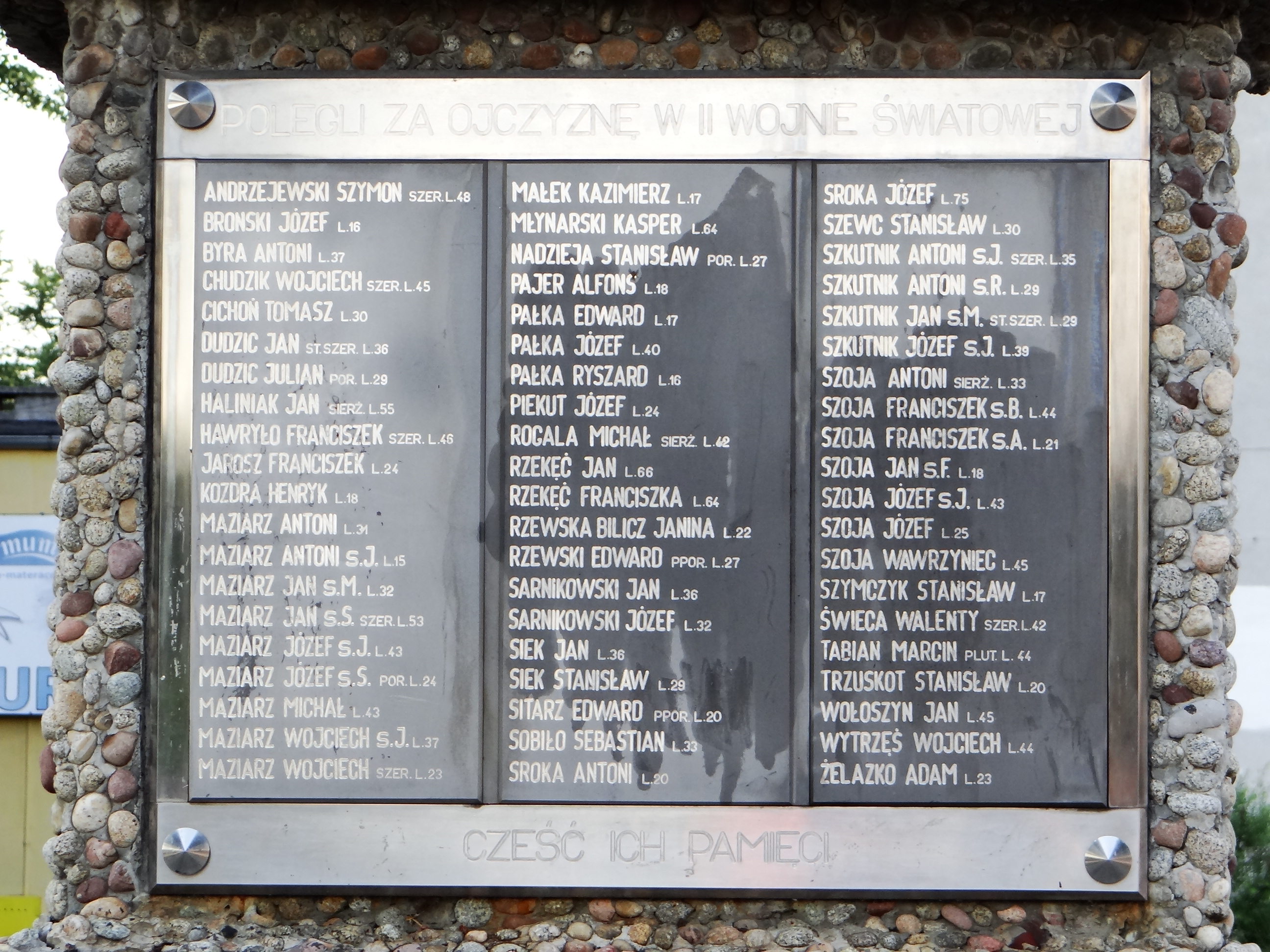 Zdjęcie wykonane w miejscowości Zarzecze, powiat niżański.